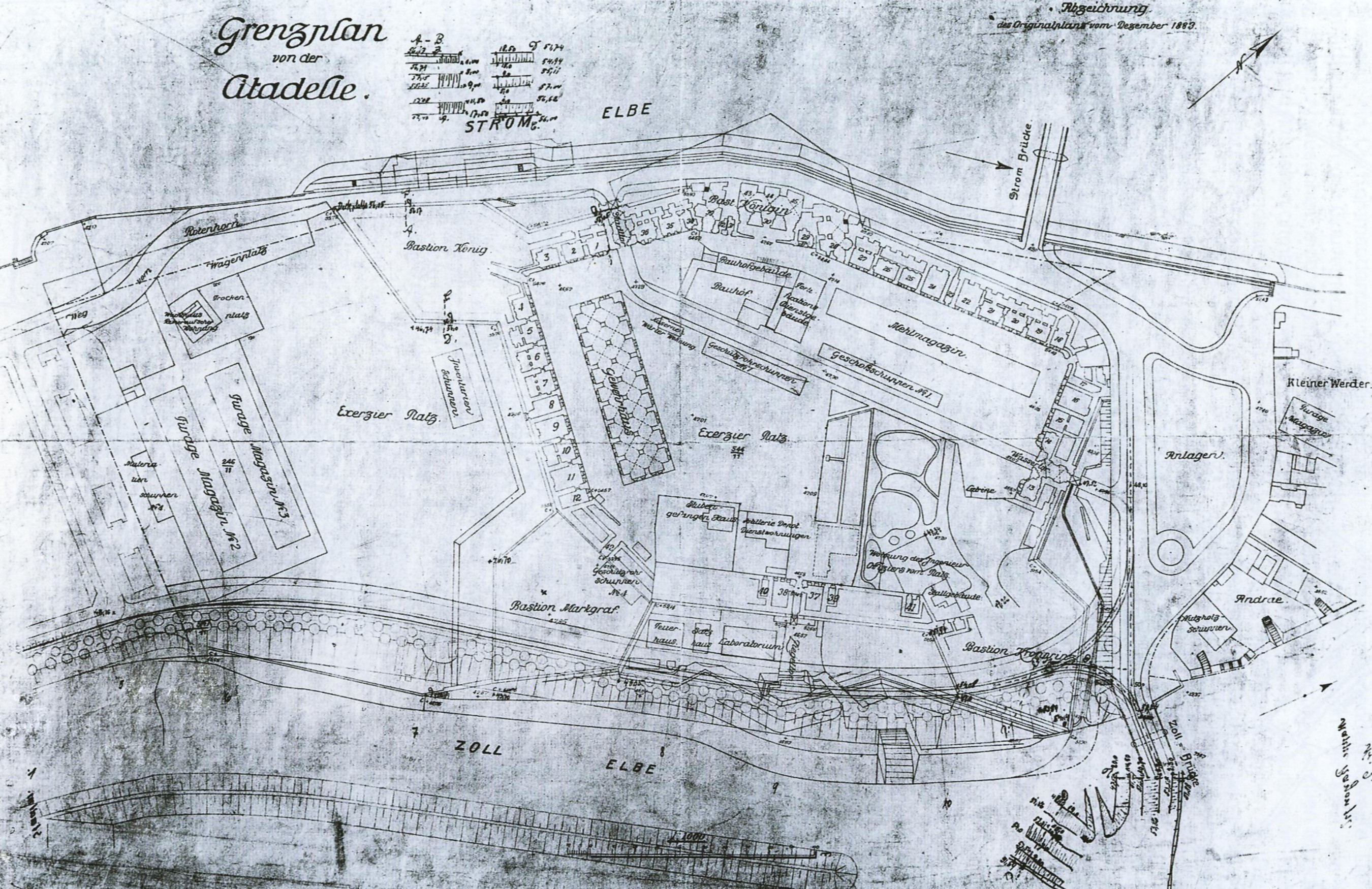 Grenzplan der Zitadelle Magdeburg